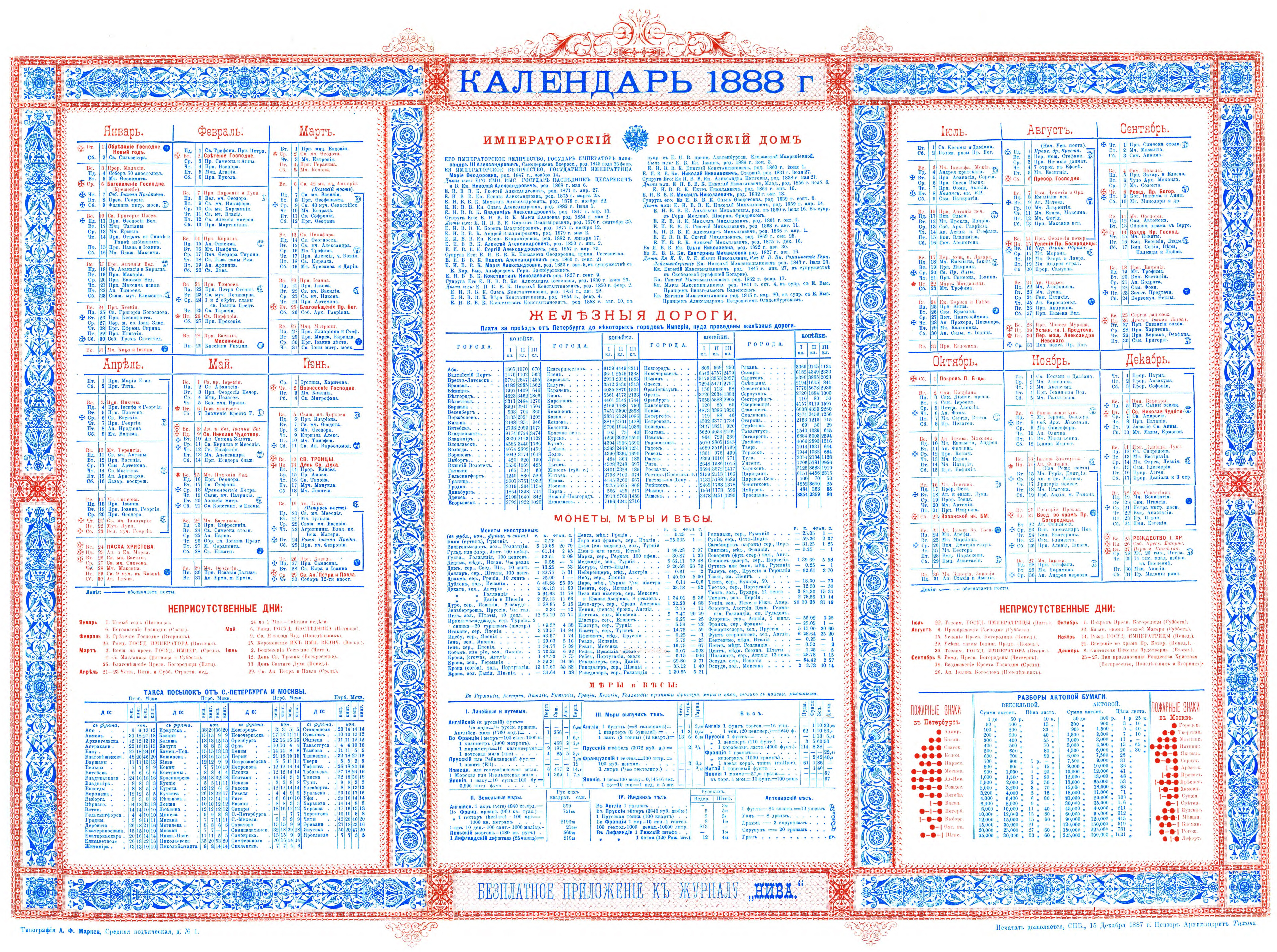 Календарь на 1888 год из приложения к журналу "Нива"